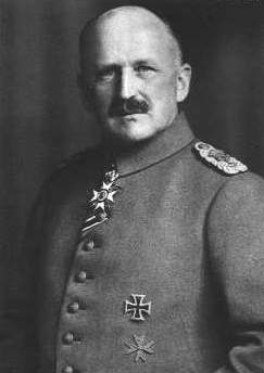 Hermann von Doettinchem de Rande, Generalmajor, Portrait